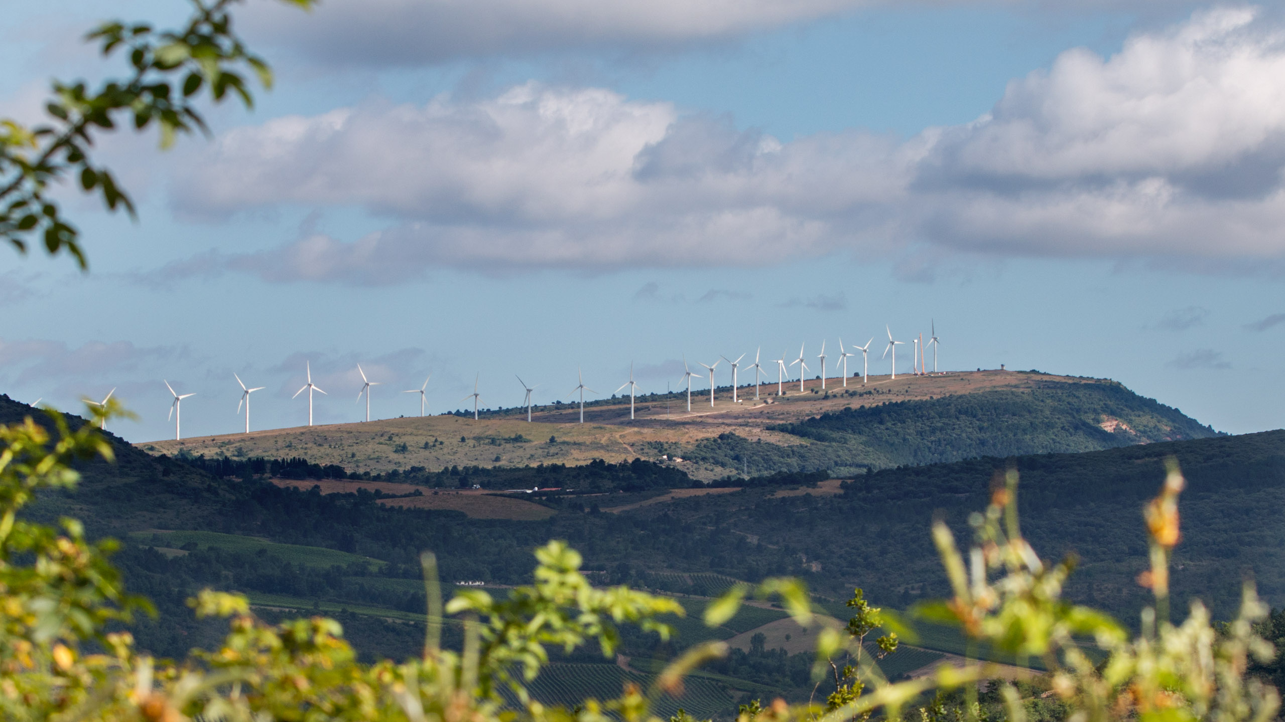 Vue lointaine